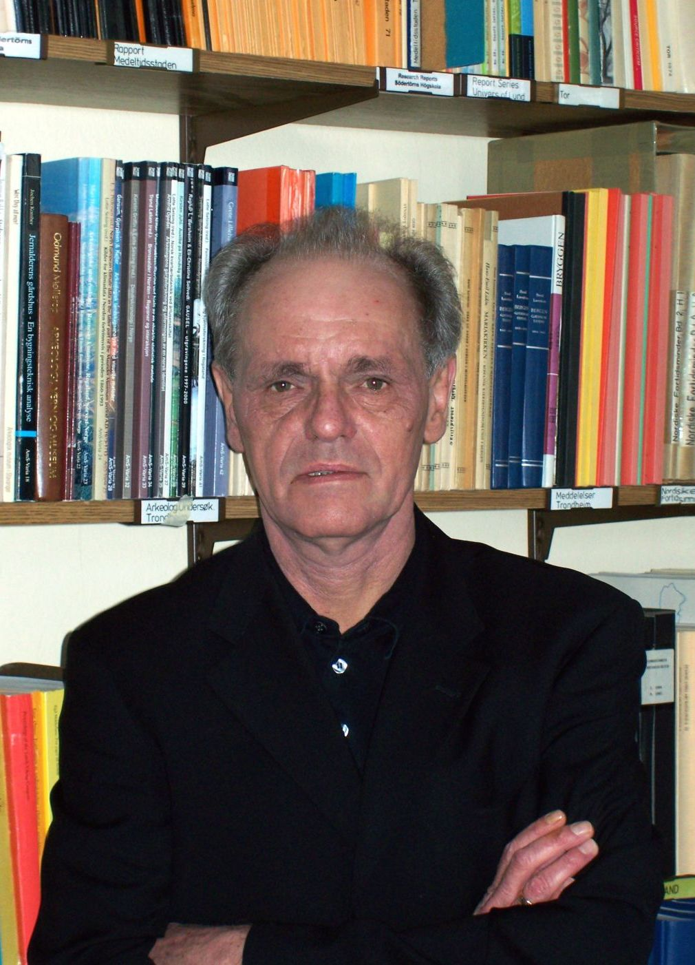 Porträt von Manfred Gläser